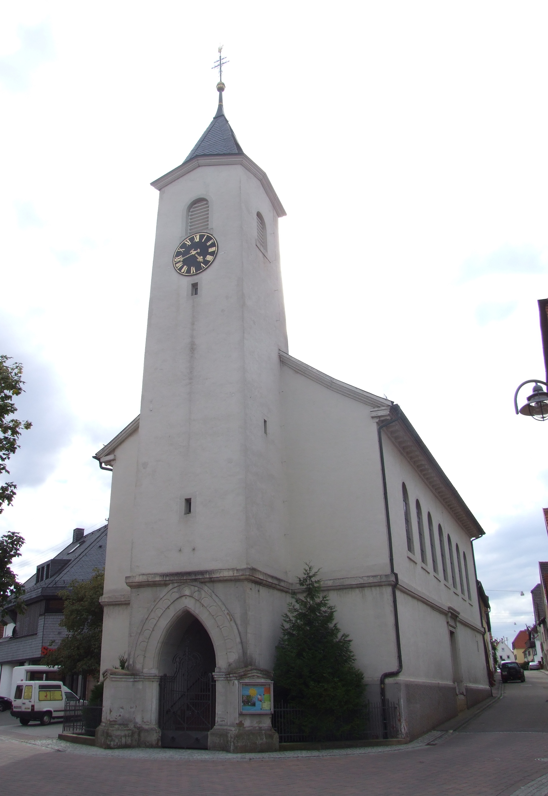 Evangelische Kirche in Eschelbronn